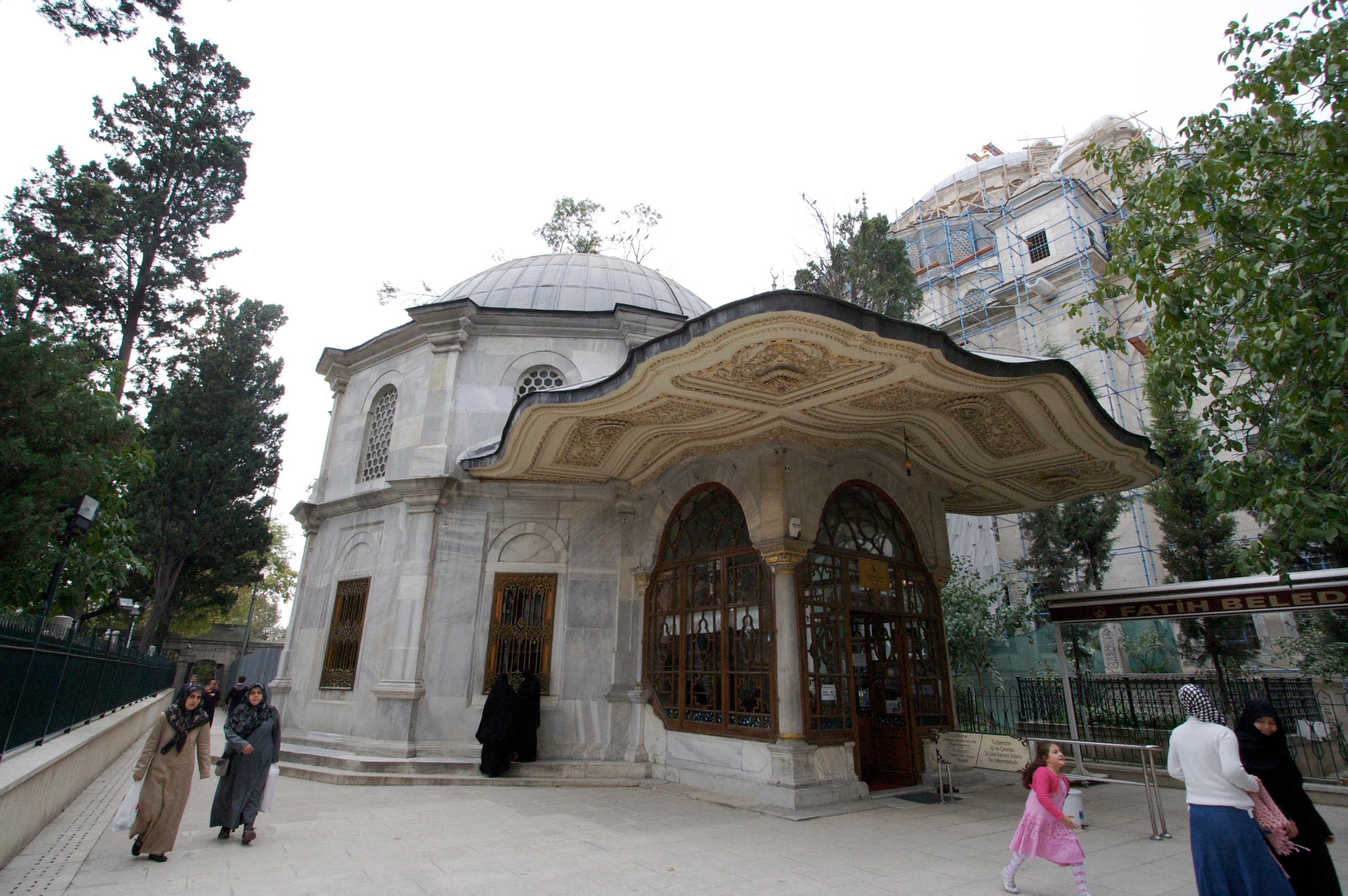 Fatih Sultan Mehmet Han Türbesi